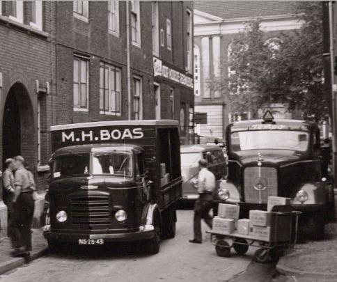 Karrier Bantam NS-28-43